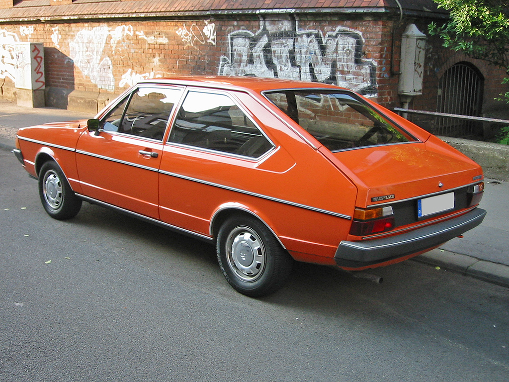 VW Passat B1 Facelift